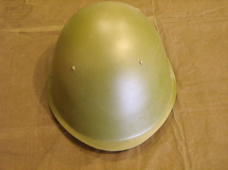 СШ-68 (іллюстрація до статі)